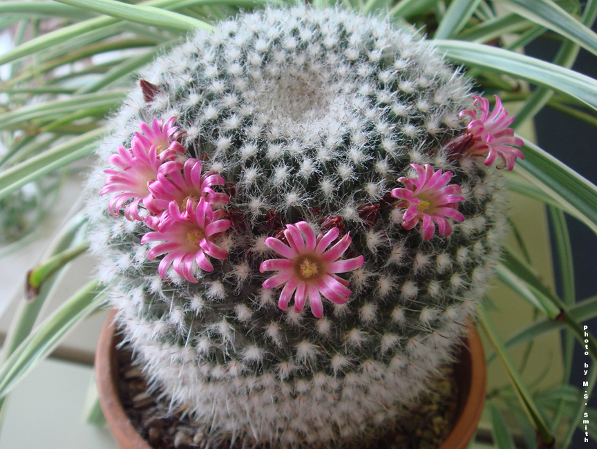 Mammillaria standleyi (craigii)